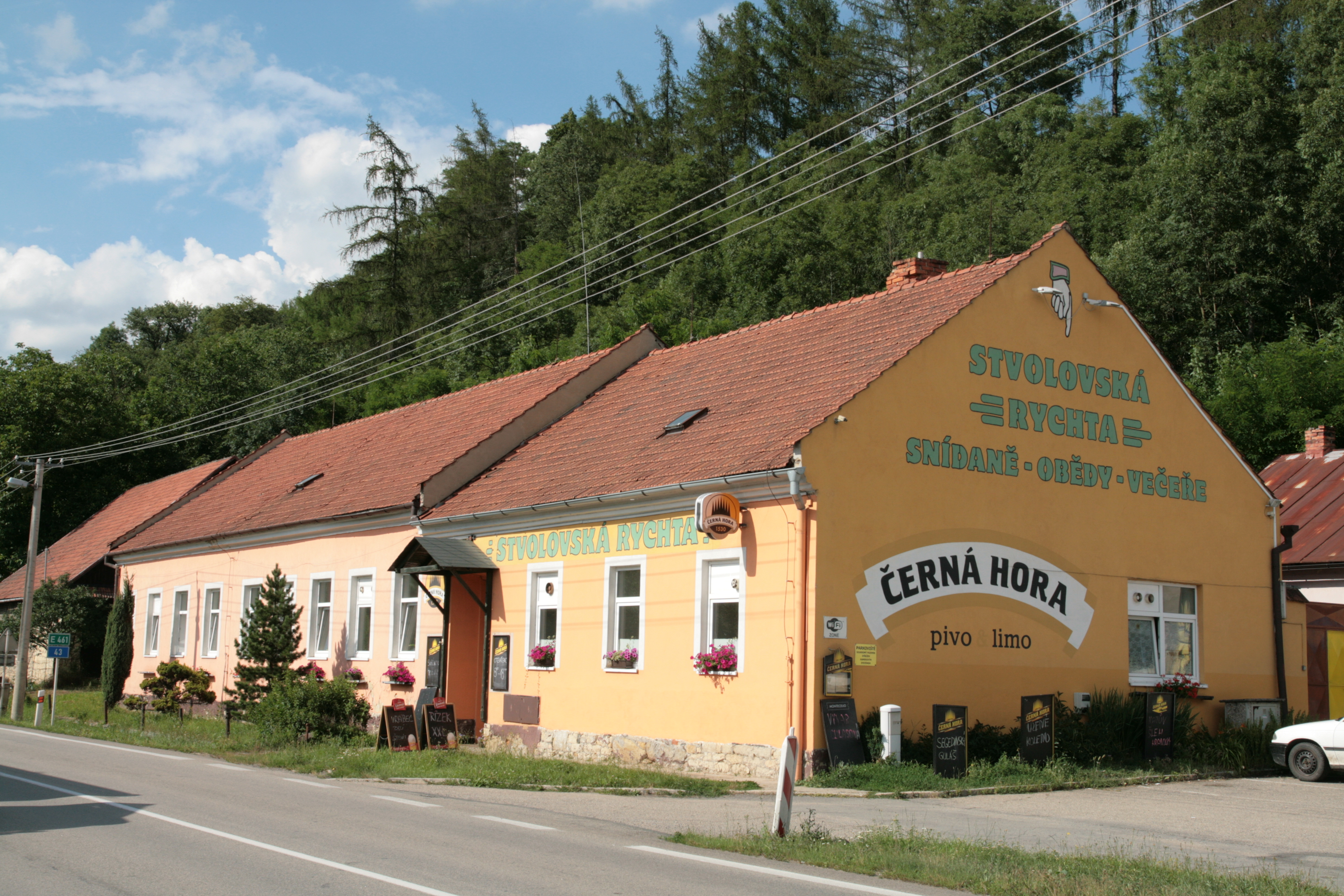 Skřib, část obce Stvolová. Restaurace Stvolovská rychta v domě čp. 2.